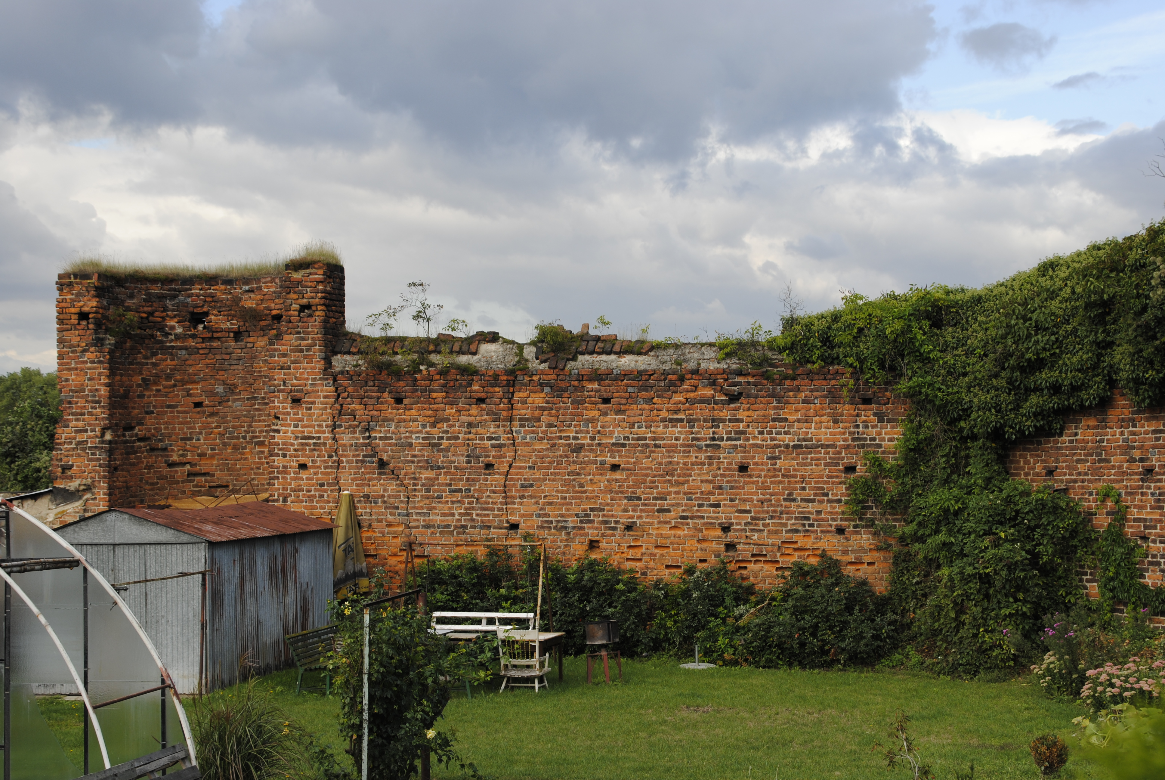 Reste der mittelalterlichen Stadtmauer in Zülz (Oberschlesien)